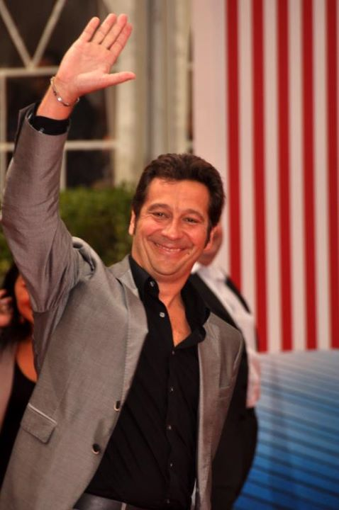 Laurent Gerra au festival de Deauville